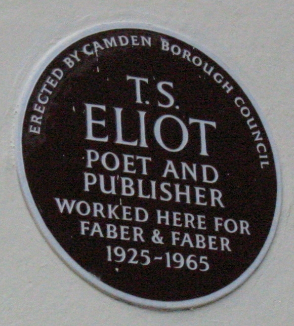 Nrf: Pliaque à Londres